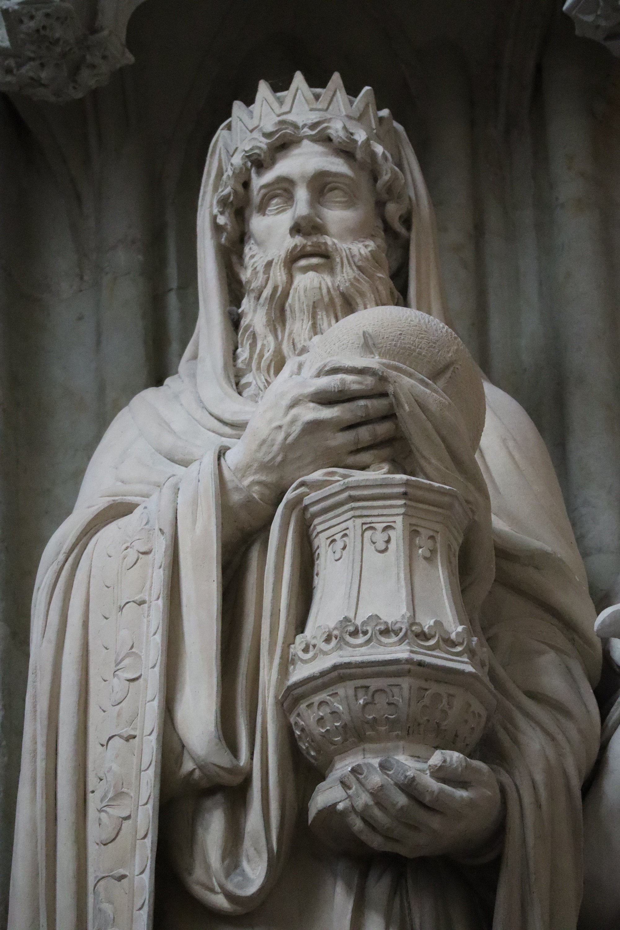 Statue de Melchisédech dans l'avant-nef de la cathédrale Saint-Pierre-et-Saint-Paul de Nantes (44).